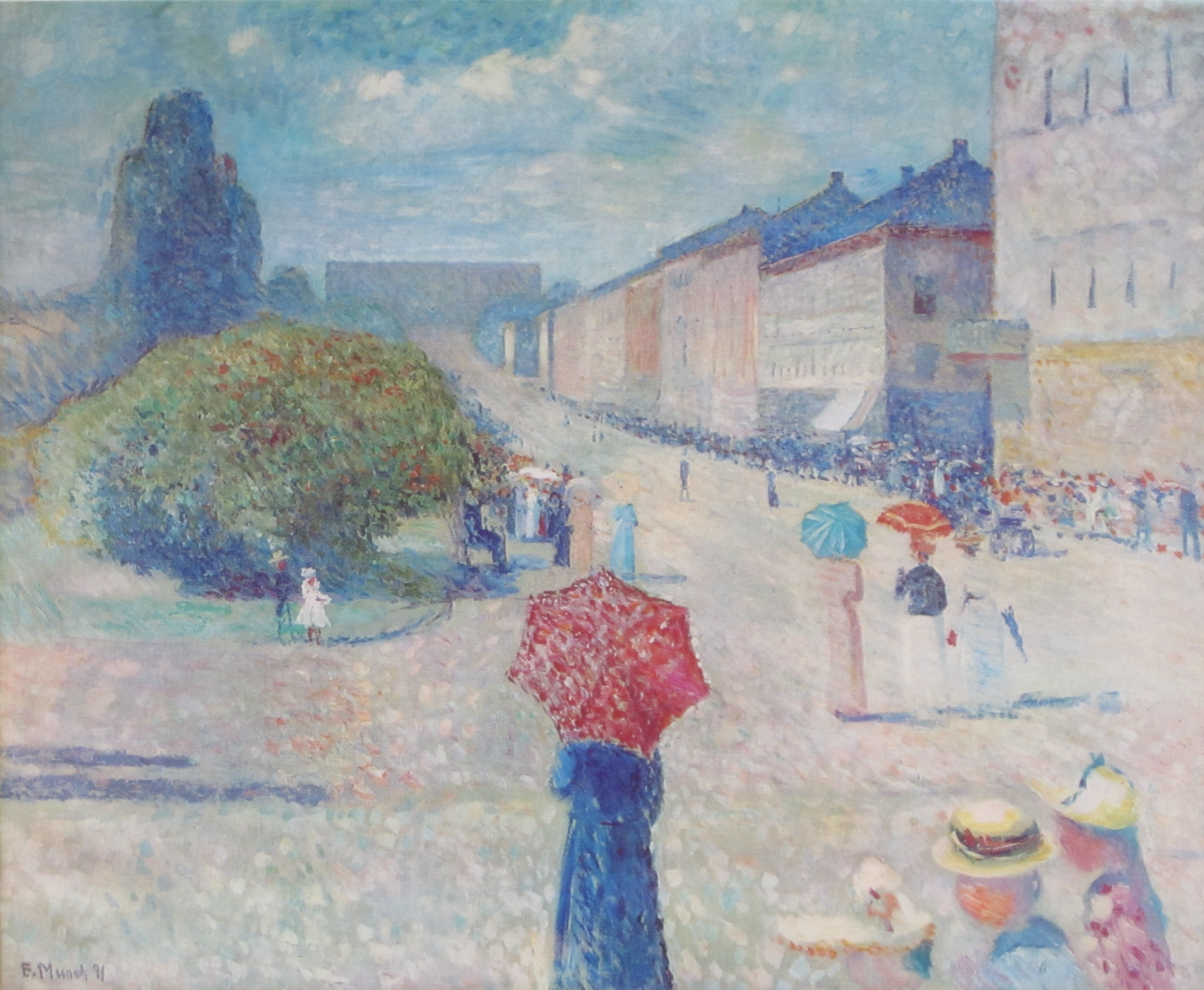 Frühling auf der Johan Karl StraßeSpring at the Johan Karl Streetlabel QS:Lde,"Frühling auf der Johan Karl Straße"label QS:Len,"Spring at the Johan Karl Street"label QS:Les,"Primavera en la calle Karl Johan"